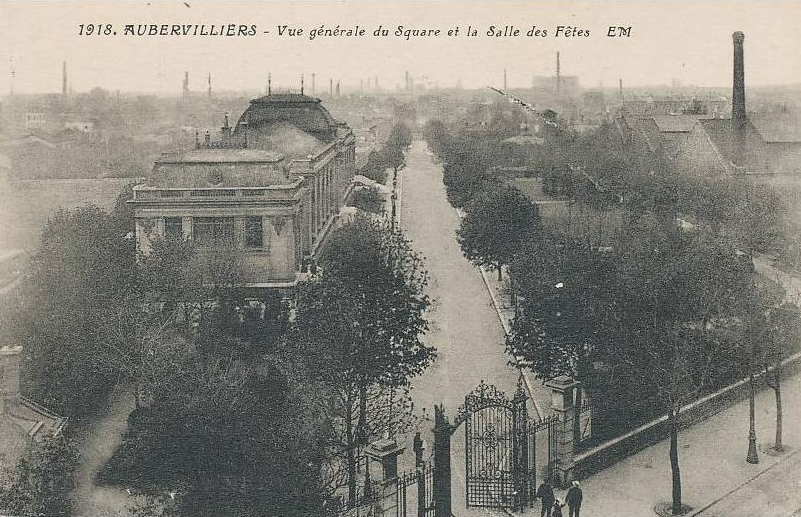 Square Stalingrad et ancienne salle des fêtes d'Aubervilliers